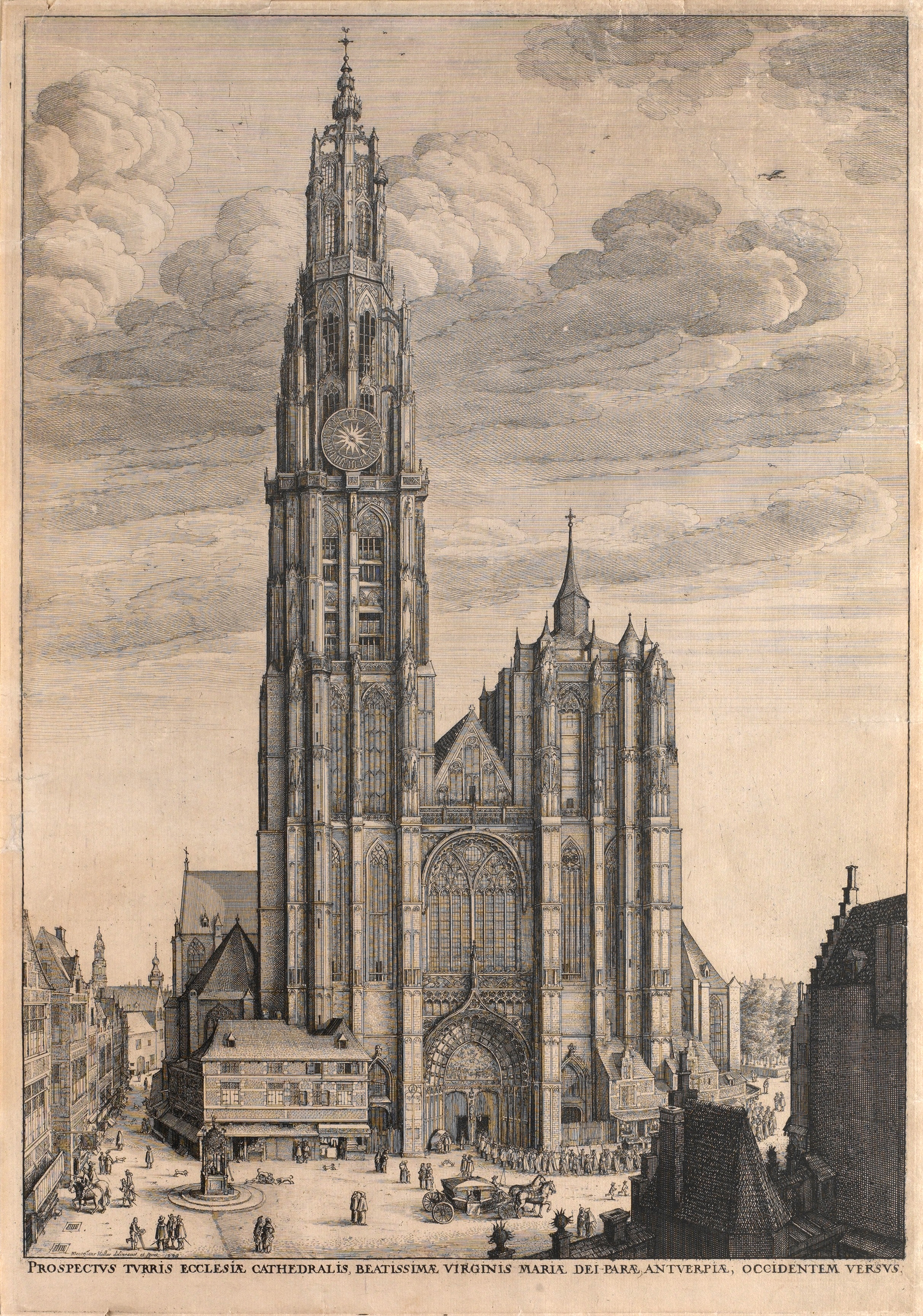 Václav Hollar: Antverpská katedrála (1649), lept, I. stav, 491x340 mm, Národní galerie v Praze